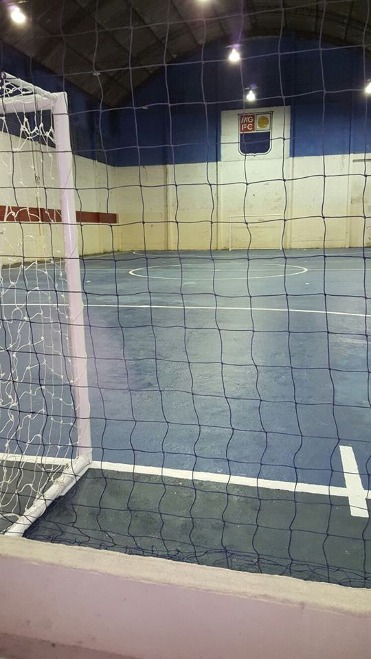 Maria da Graça visto por dentro